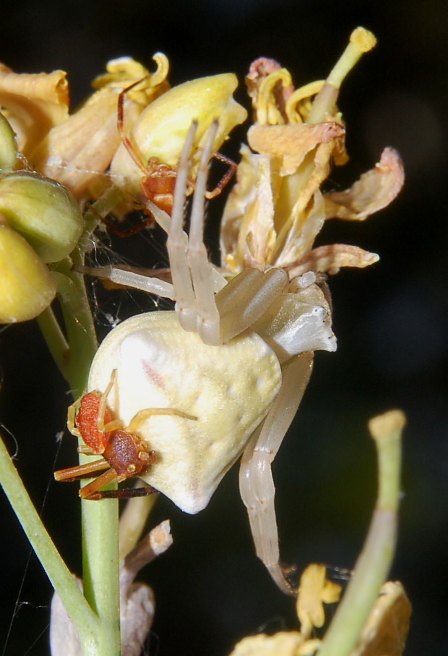 Thomisus onustus, Weibchen mit Männchen. Ein zweites Männchen befindet sich oberhalb des Weibchens. Brache in Berlin Mitte, Deutschland